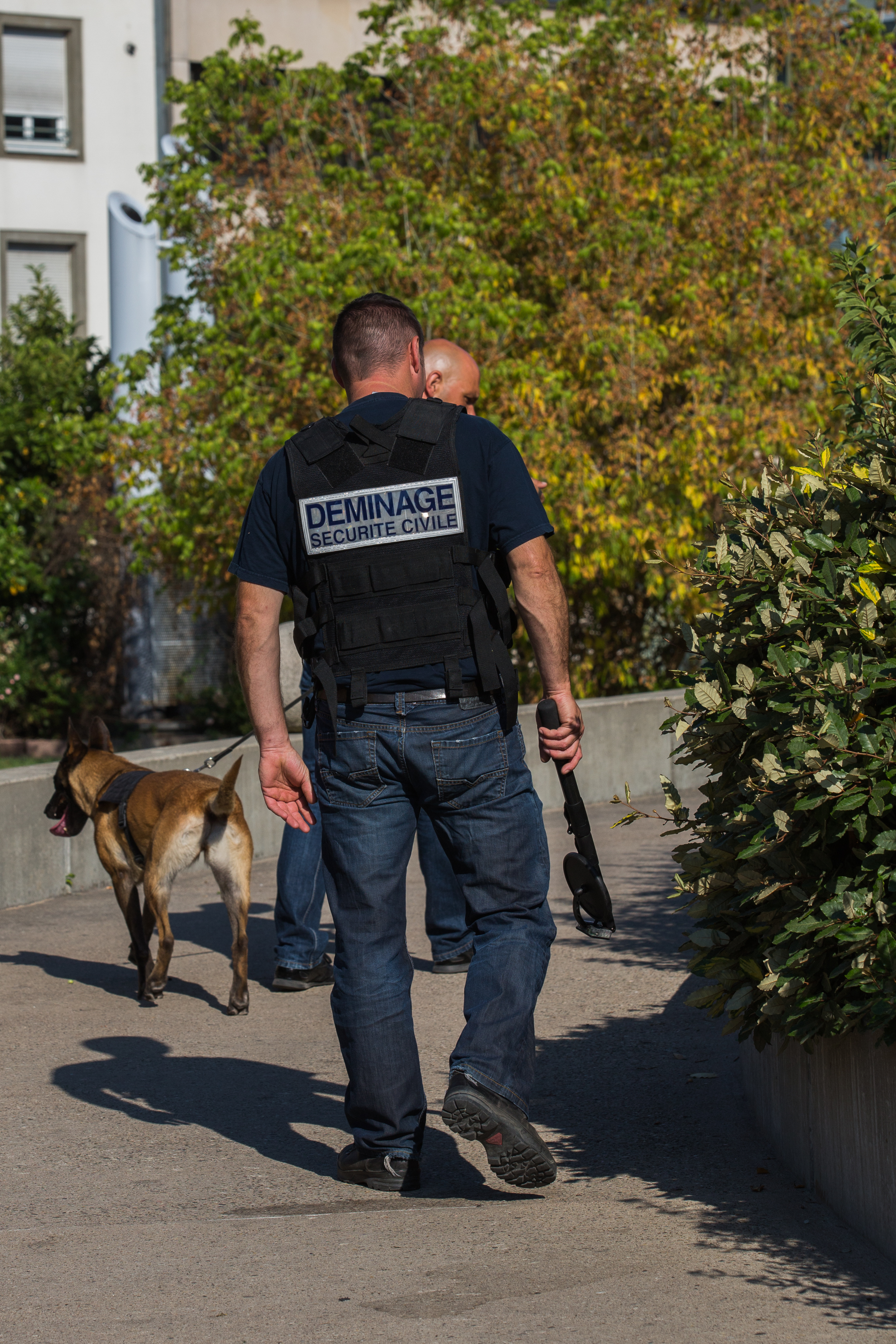 Démineurs de la Sécurité civile à Strasbourg en juillet 2013